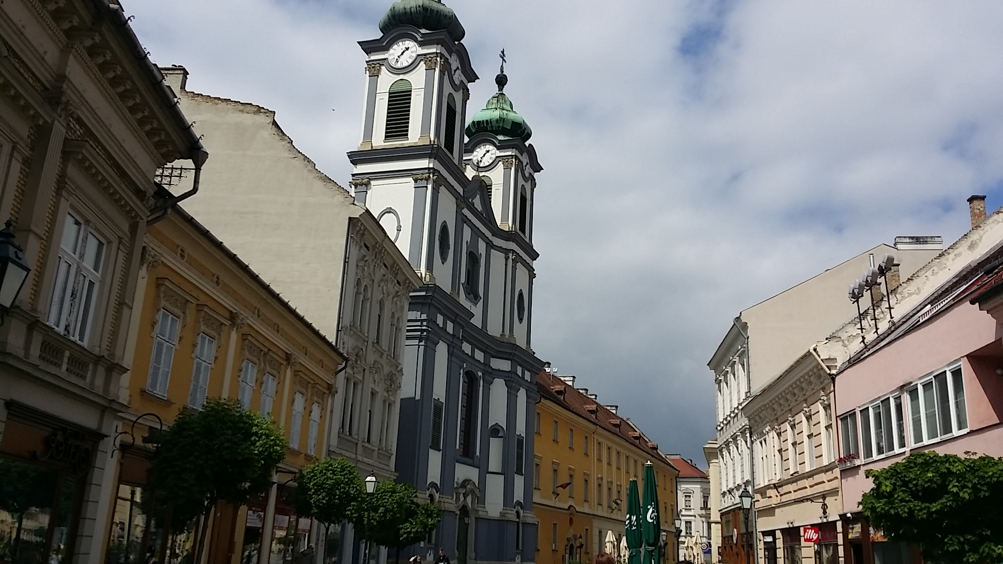 Nagyboldogasszony - Nepomuki Szent János templom